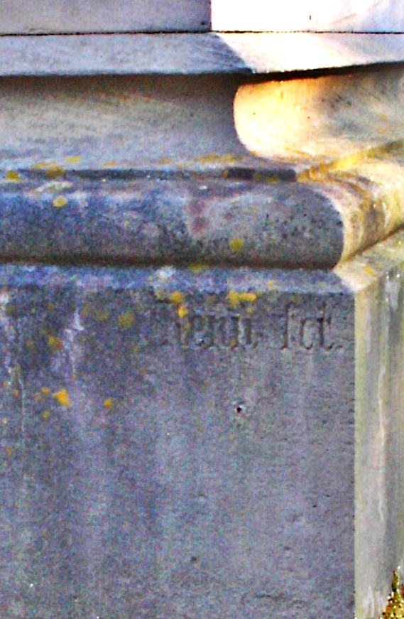 Gottfried Renn, Bildhauer Speyer (1818-1880) Werksignatur am Friedhofkreuz Hauptfriedhof Speyer